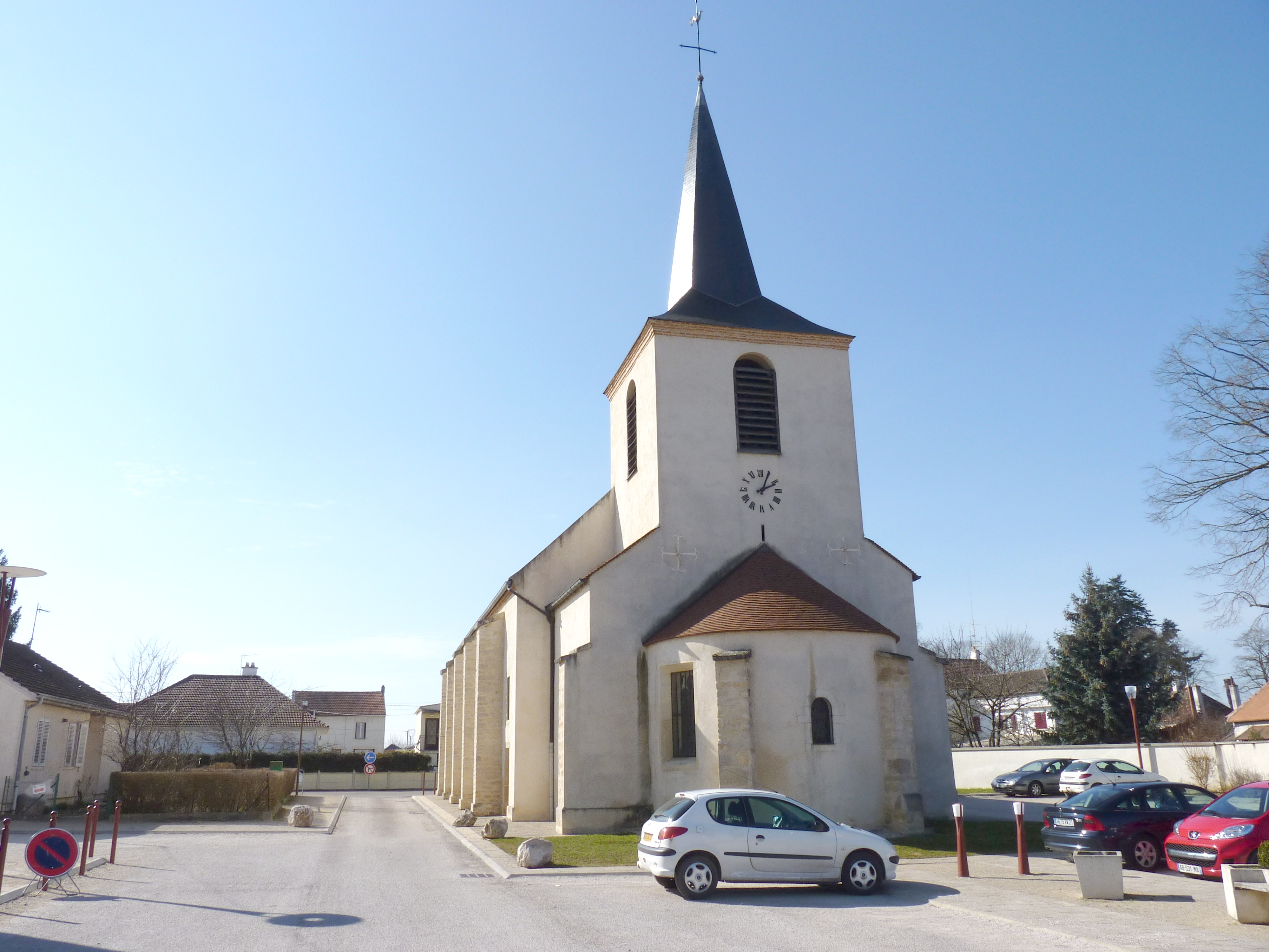 Église, Aiserey (Côte d'Or, Bourgogne, France)